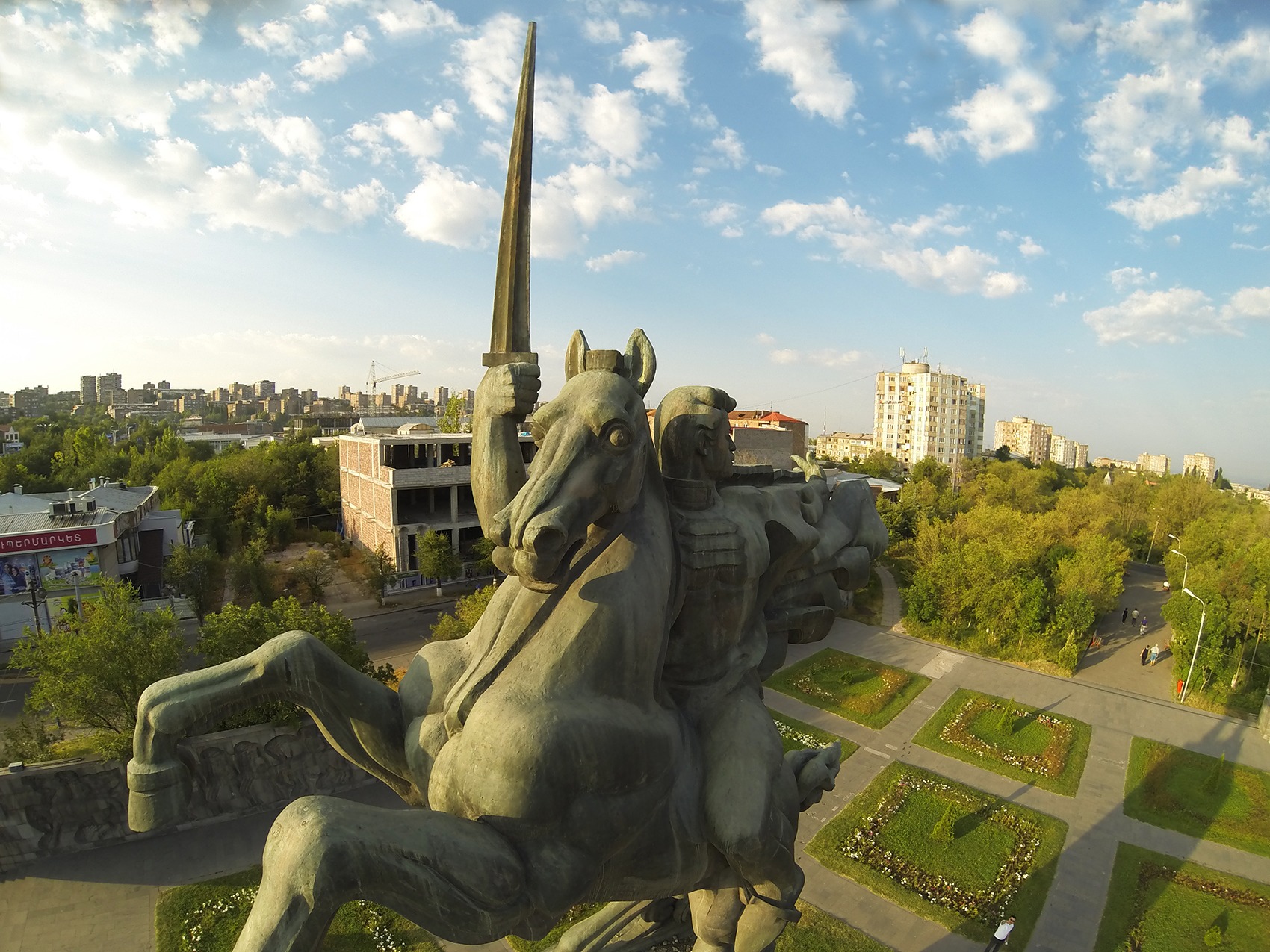 Գայի արձան 360yerevan 8/13